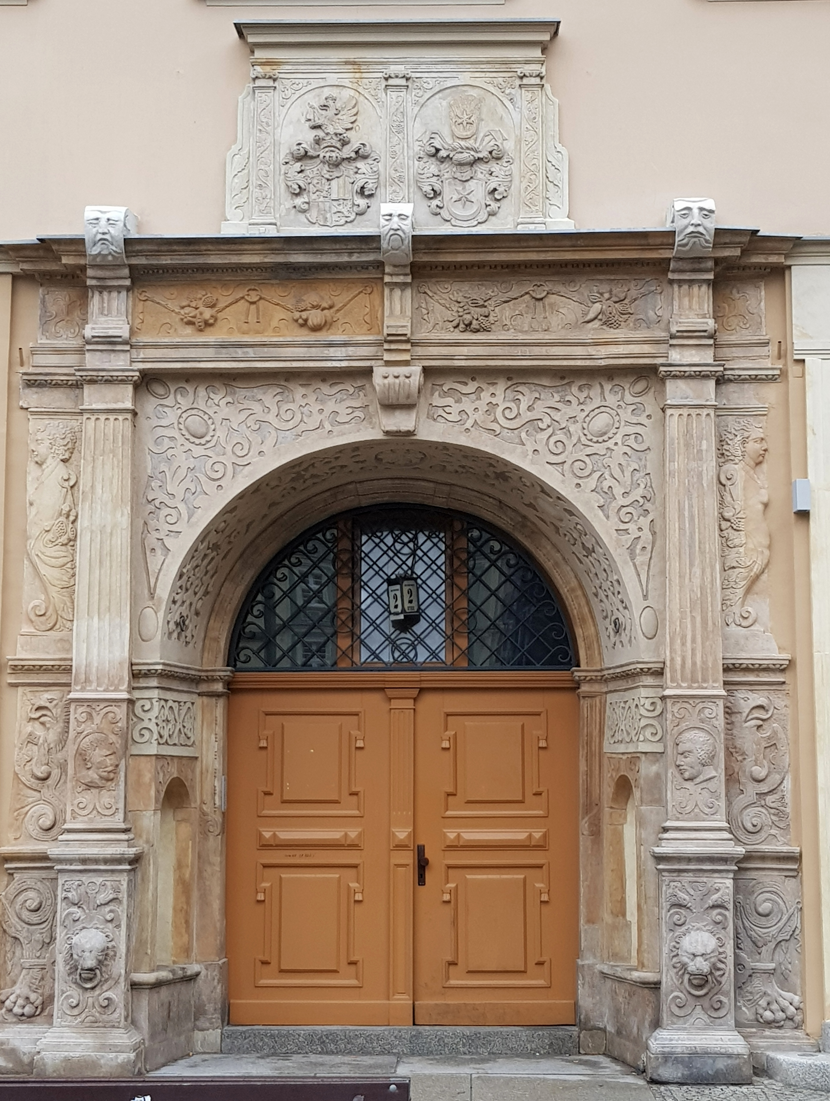 Portal Kamienicy pod Gryfami we Wrocławiu